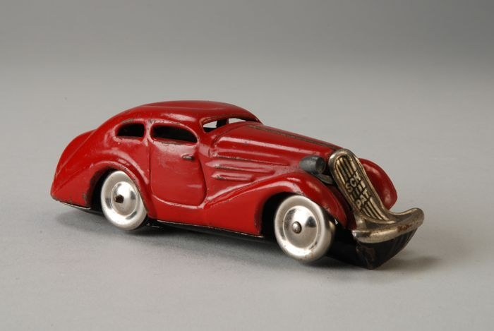 Rode “Schuco” opwindauto, model Patent-Auto of ‘Wendeauto’, ook omkeerauto genoemd.Carrosserie uit één stuk. Voorbumper en radiator uit één stuk. Opwindmechanisme. Rood met zilverkleurige wielen. Zwarte onderzijde met tandwiel. De auto kon op elk glad oppervlak rijden zonder ervan af te vallen (de zogenaamde turn-back feature).